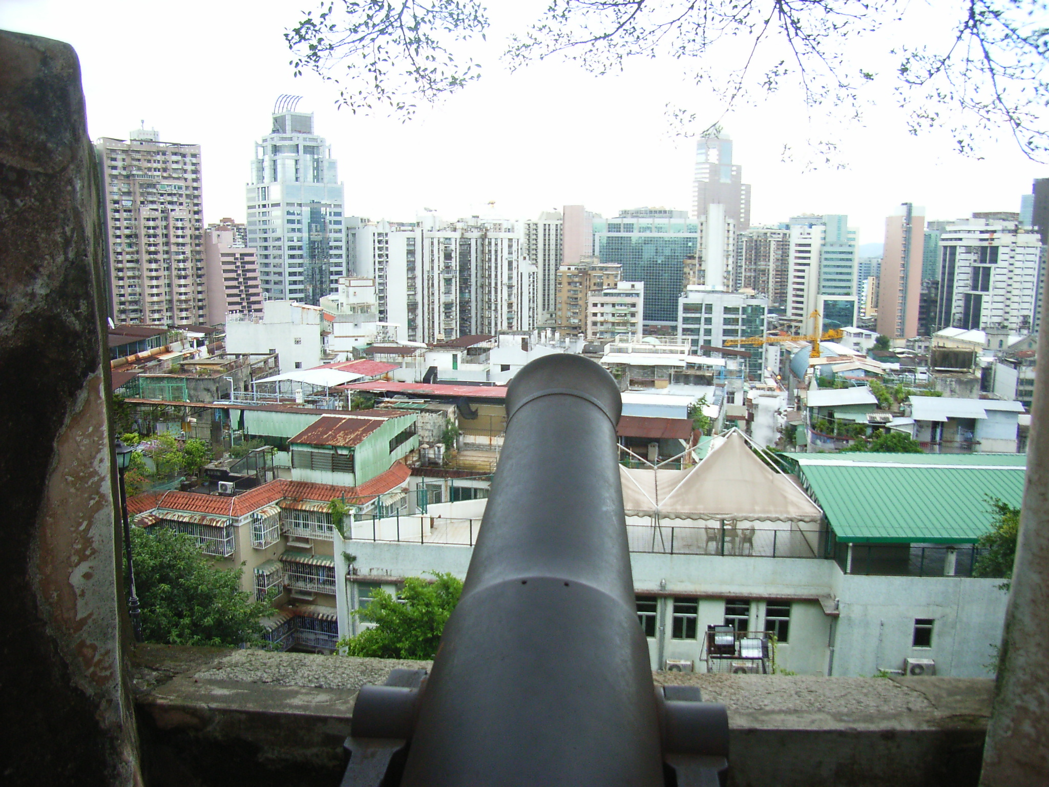 Macau Montain Fortress 澳門大炮台